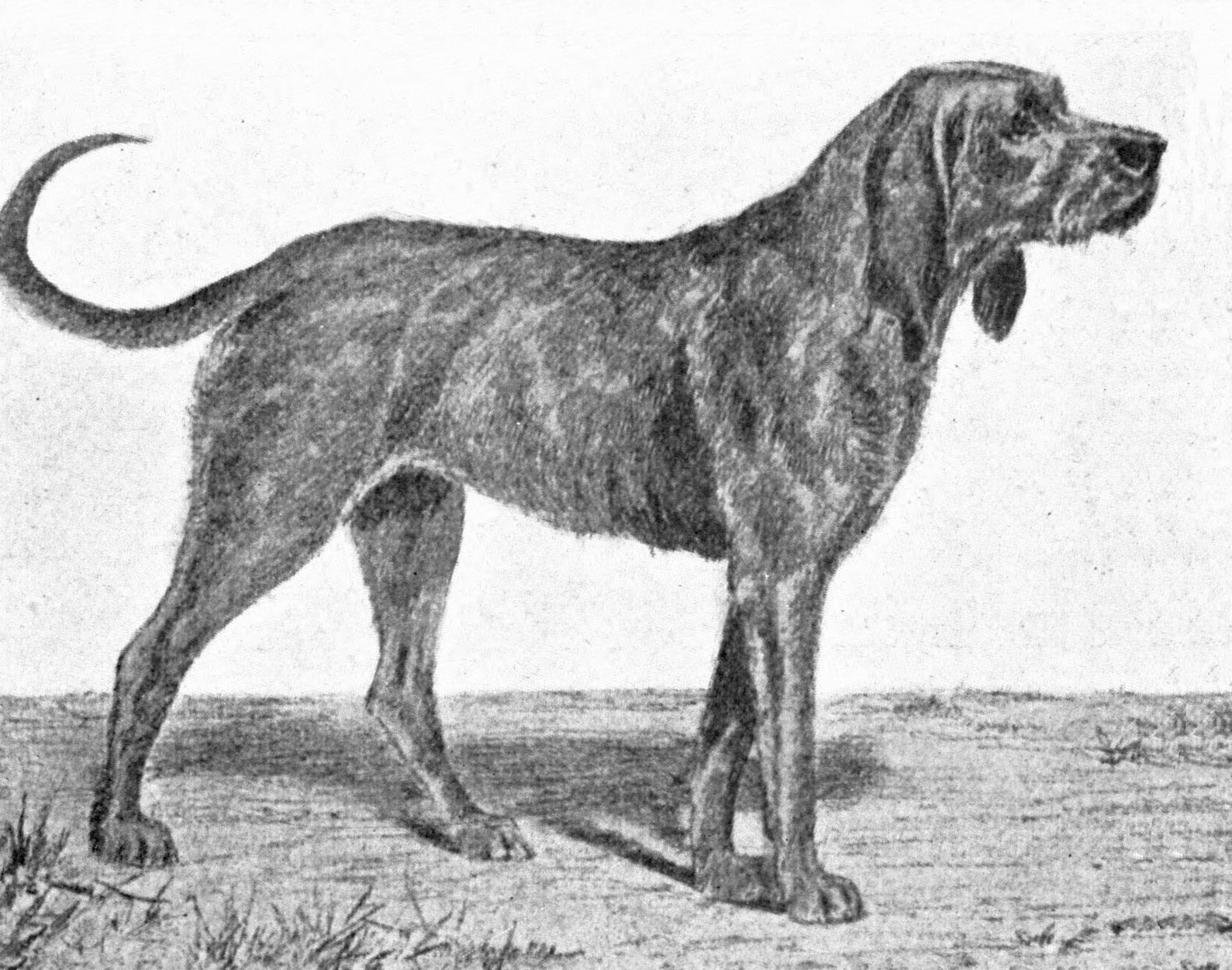 Gris De Saint-Louis from 1915